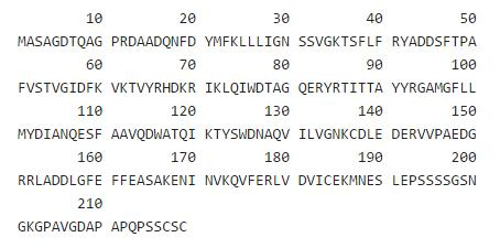 Secuencia de aminoácidos que forman la Rab3D